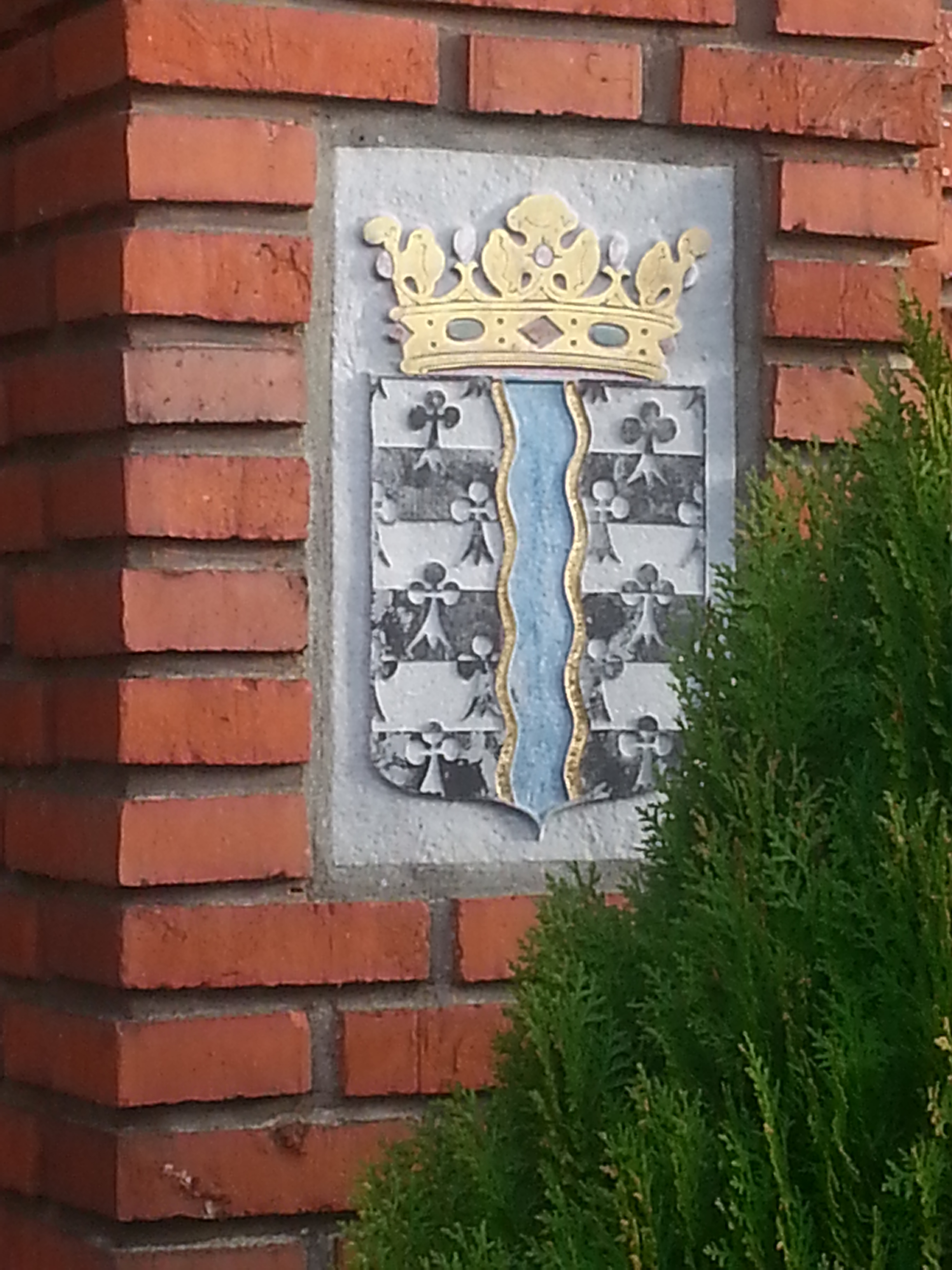 Het wapen van het voormalige waterschap De Oude Vaart in Beilen.